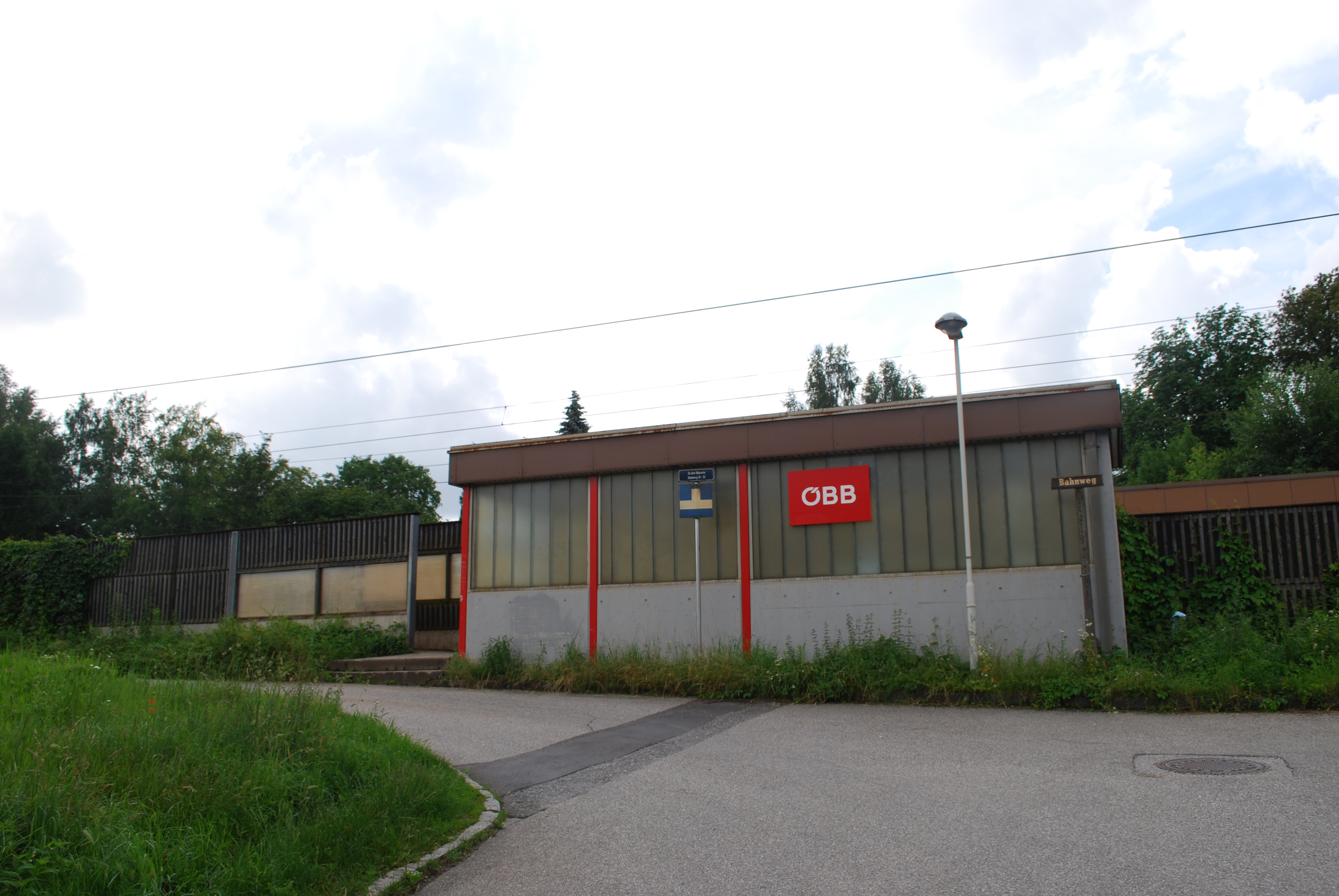 Bahnhof Leonding